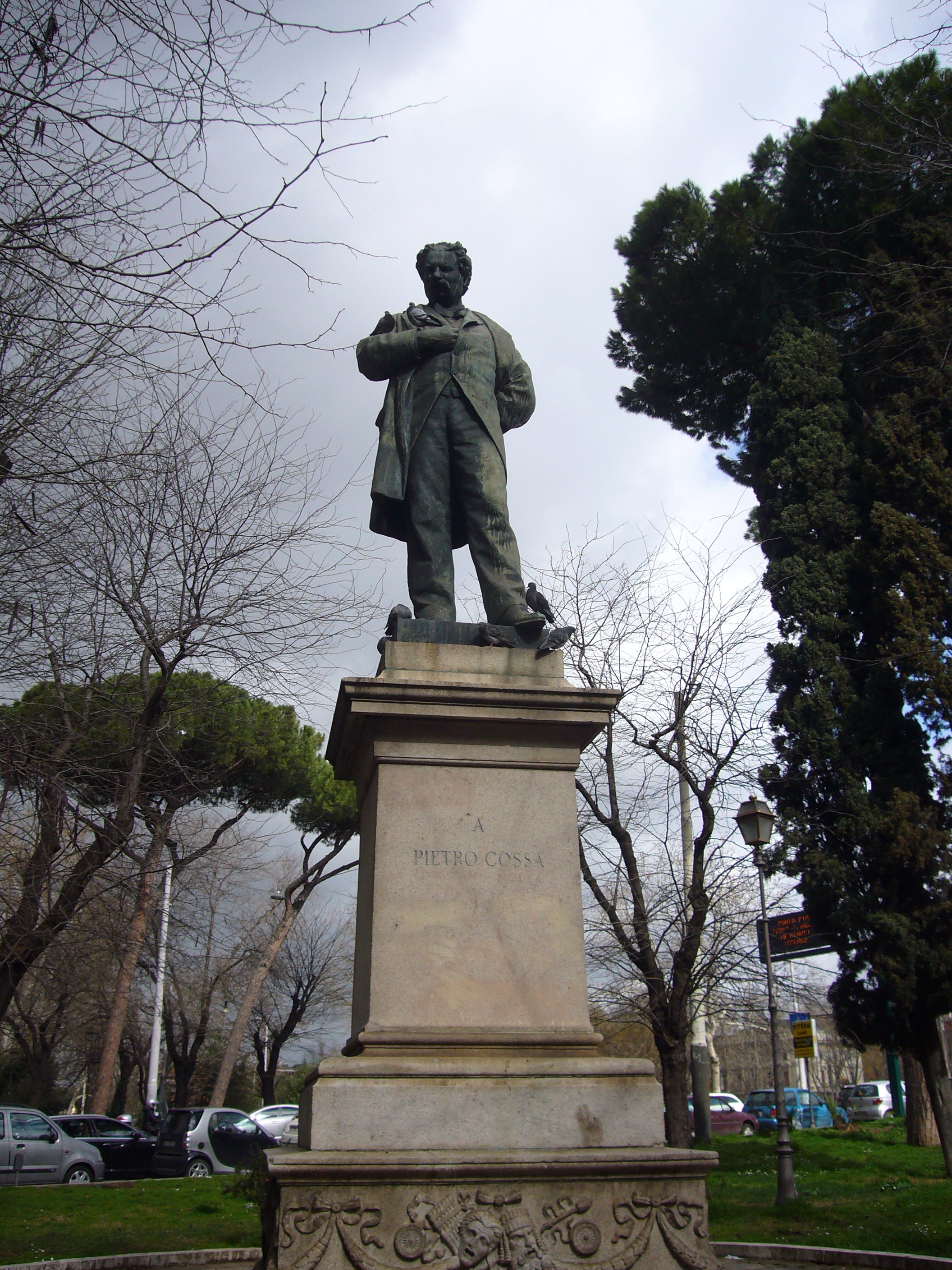 Roma, piazza della Libertà, monumento a Pietro Cossa (Adolfo Sanguinetti, 1895)